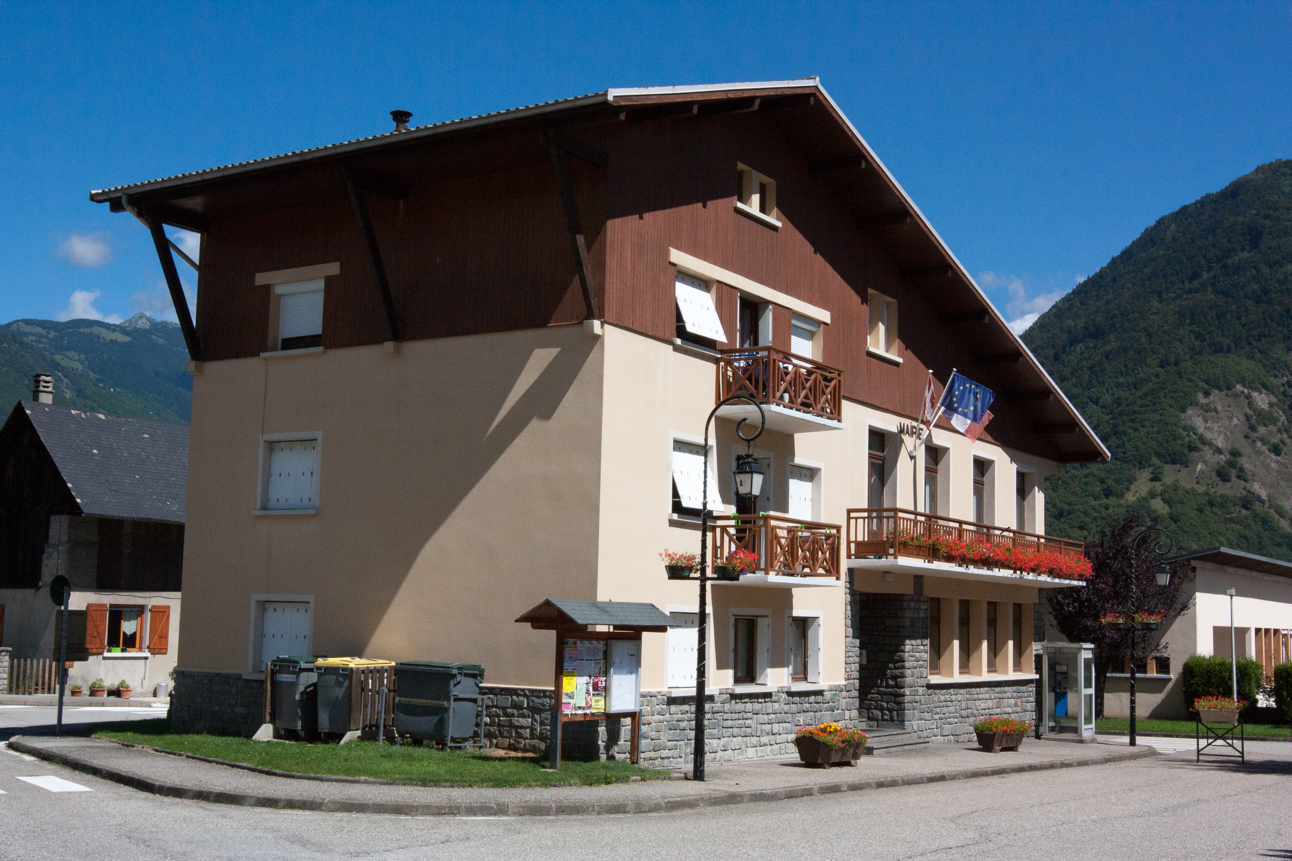 Mairie de Sainte-Marie-de-Cuines / Sainte-Marie-de-Cuines / Savoie / France